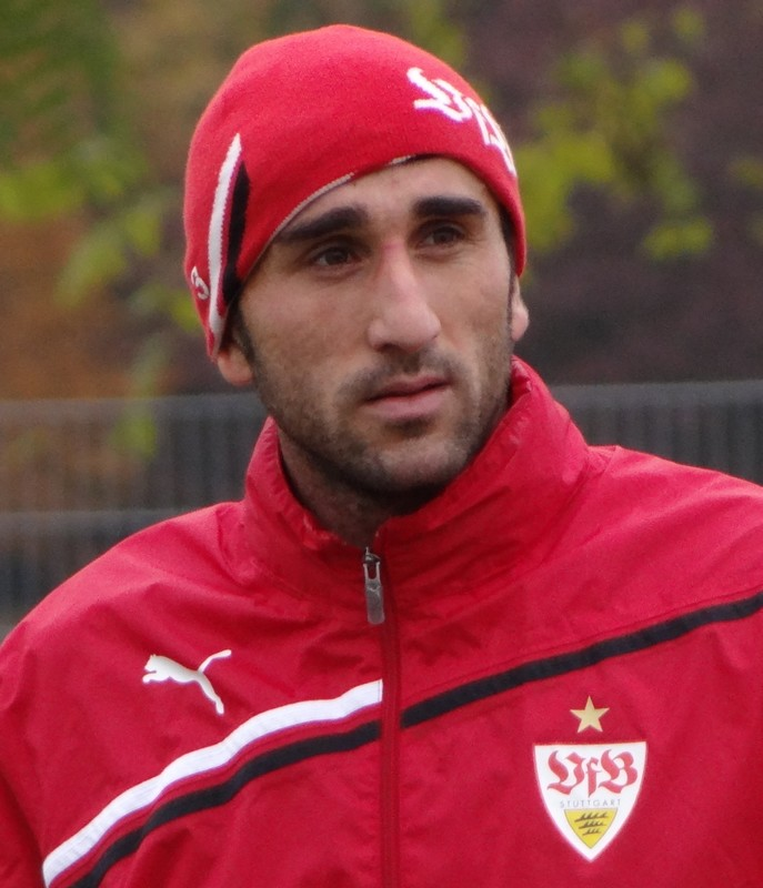 Cristian Molinaro. Aufgenommen von